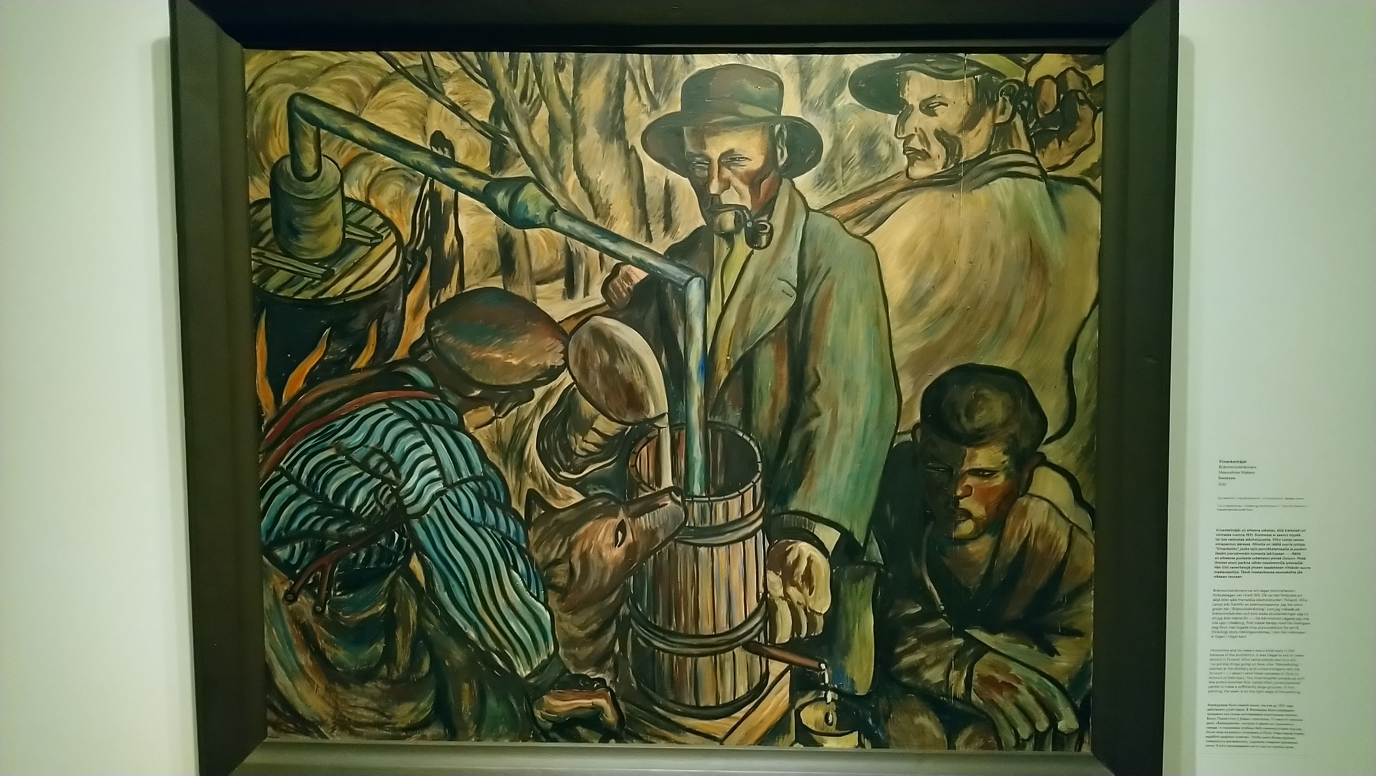 Vilho Lampi: Die Schwarzbrenner (Viinakeittäjät), 1930 Foto bei Ausstellung HAM 2020